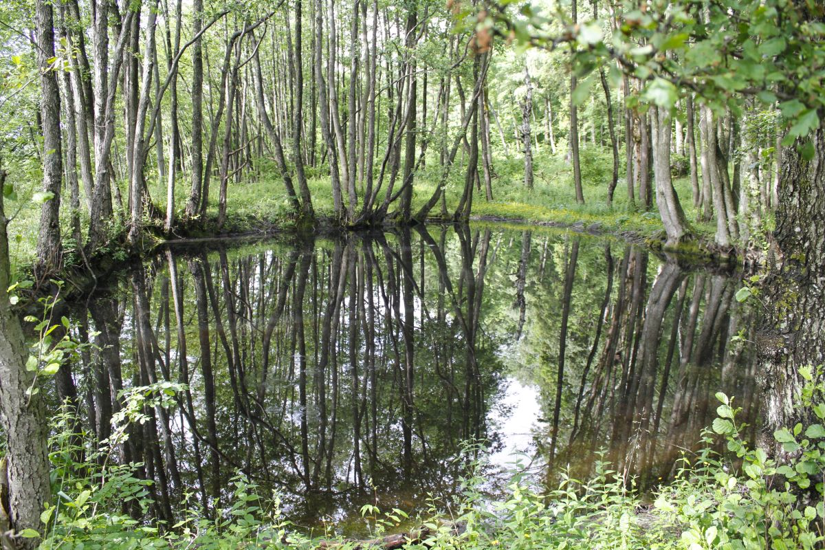 Bastøya har et stort mangfold av ulike treslag og skogtyper.